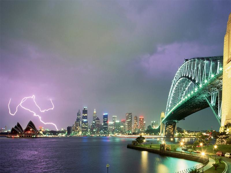 Sydney Storm